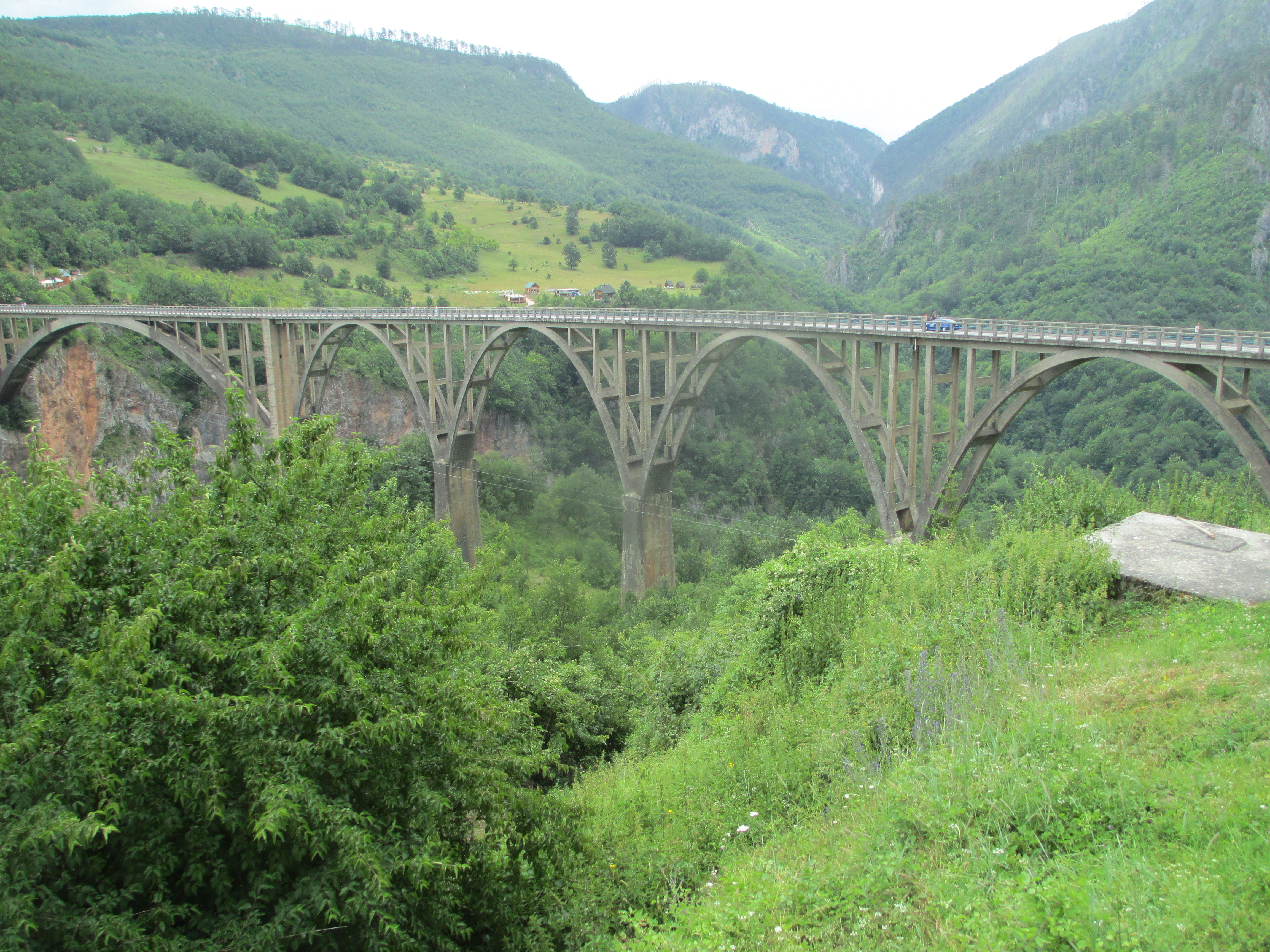 גשר ג'ורג'וויצה מעל קניון נהר טארה